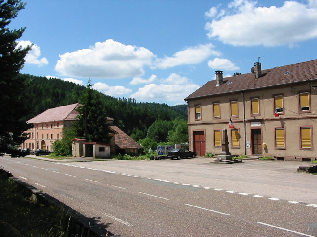 Bois-de-Champ Commune du canton de Brouvelieures (Vosges) Photo personnelle du 10 juillet 2006. Copyright © Christian Amet